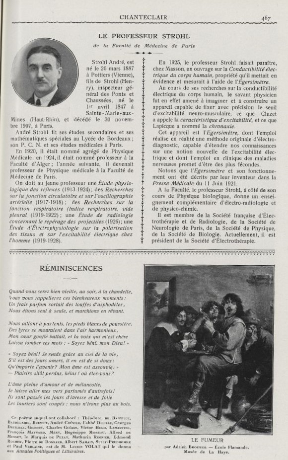 Chanteclair . - 1928. - 23e année Pour établir des liens vers ce document, utiliser les URL ci-dessous : Livre : Page : Licence ouverte